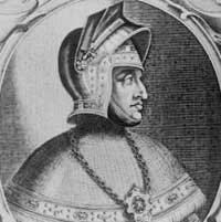 kartause gaming